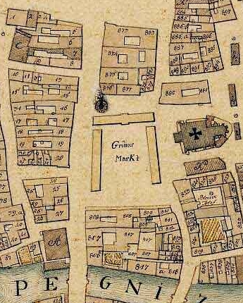 Der Nürnberger Hauptmarkt auf einem Ausschnitt eines Ortsblatts Nürnbergs aus dem Jahre 1811